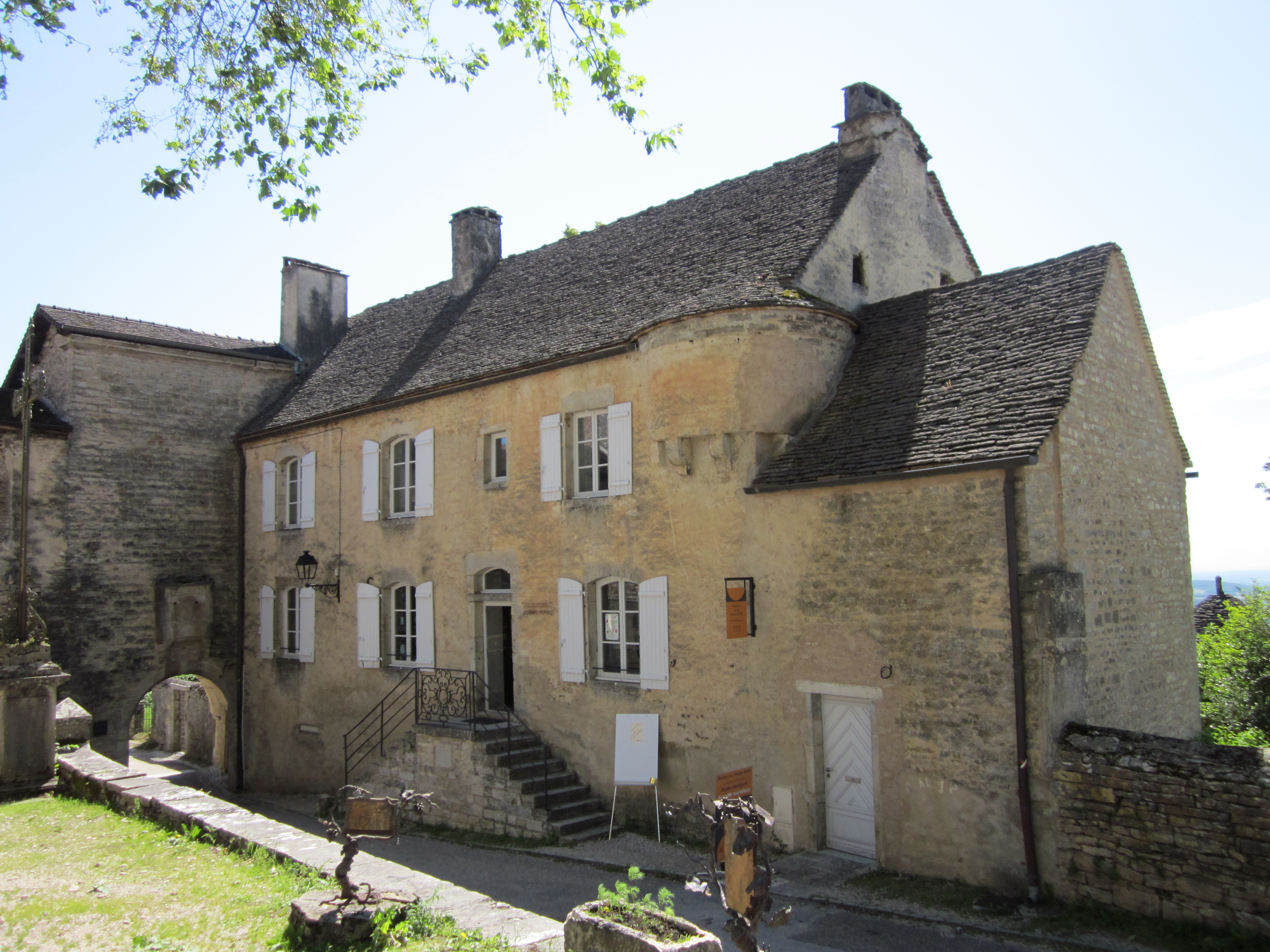 La maison « Froid Pignon », située en face de l'église de Château-Chalon était probablement l'hôtellerie de l'abbaye.